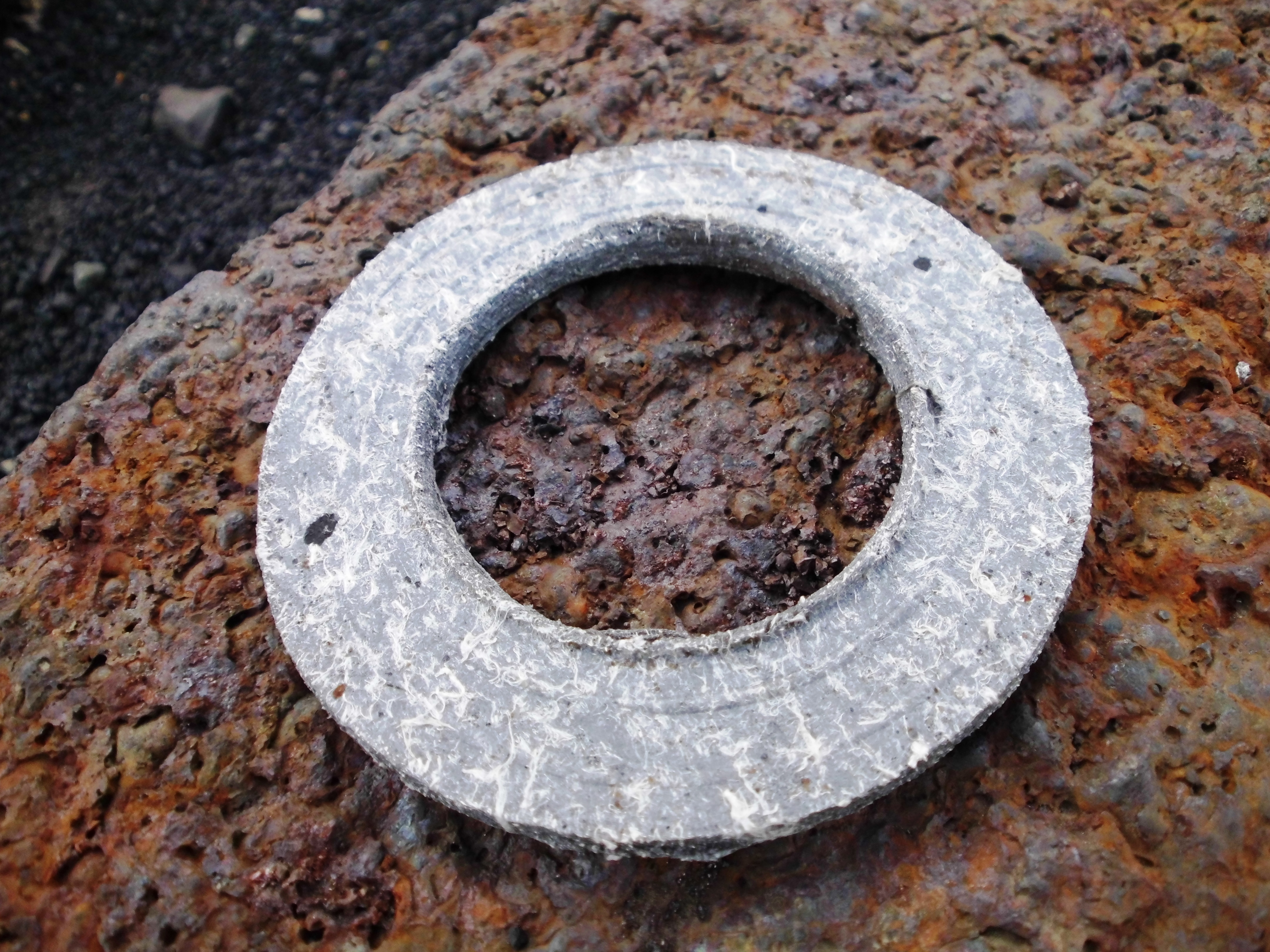 Фланцевая уплотнительная прокладка бывшая в употреблении (герметизация стыков трубопровода со сжатым воздухом).